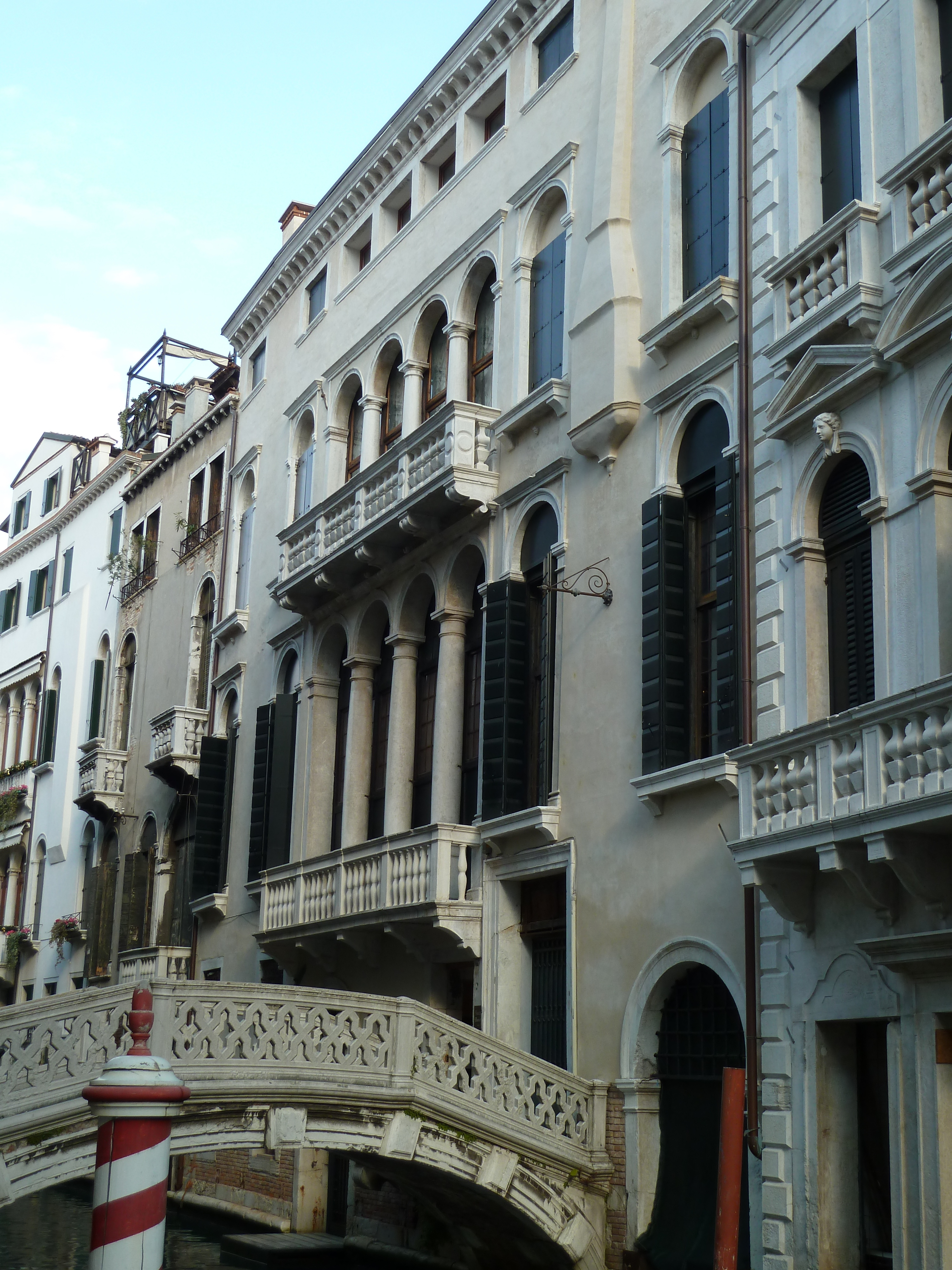 Pal Foscarini